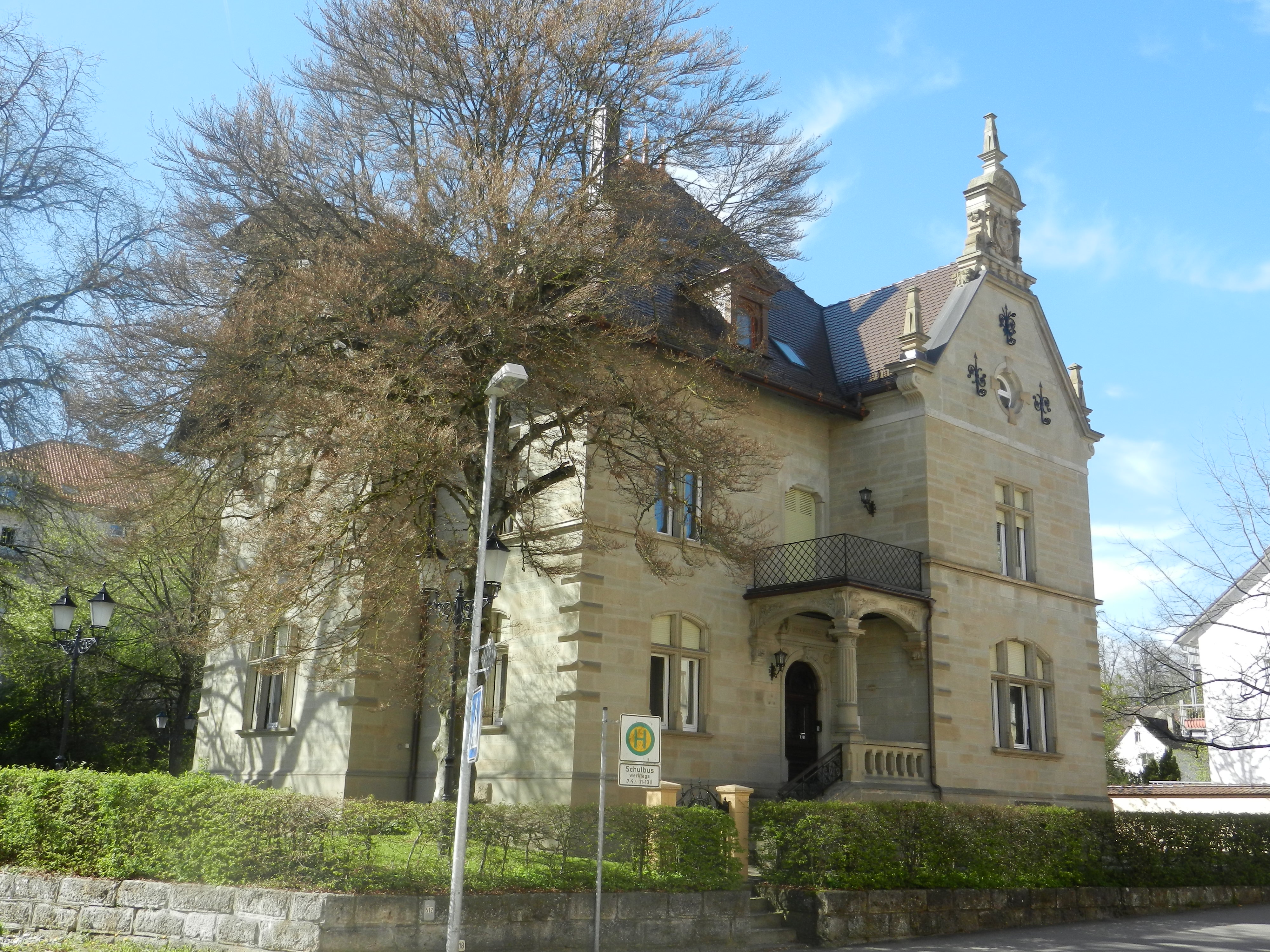 ehemaliges Forstamt in Meßkirch